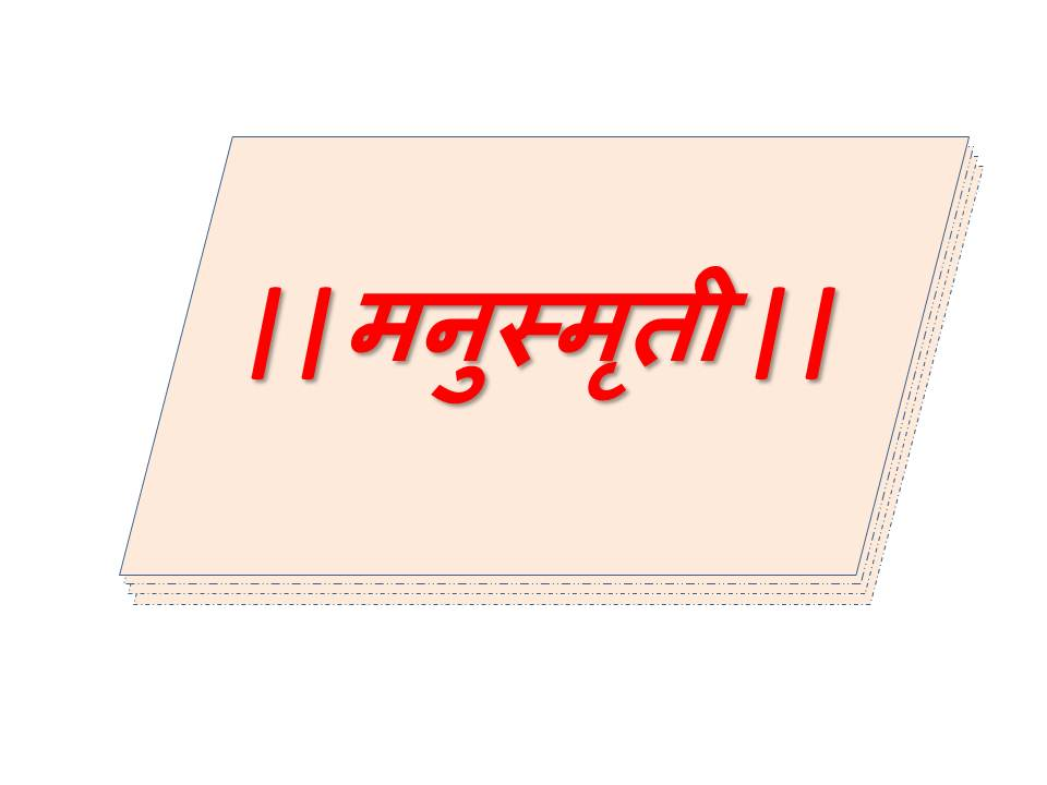 मनुस्मृति